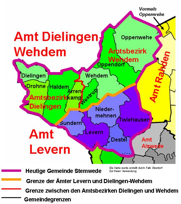 Karte der ehemaligen Ämter Dielingen-Wehdem und Levern